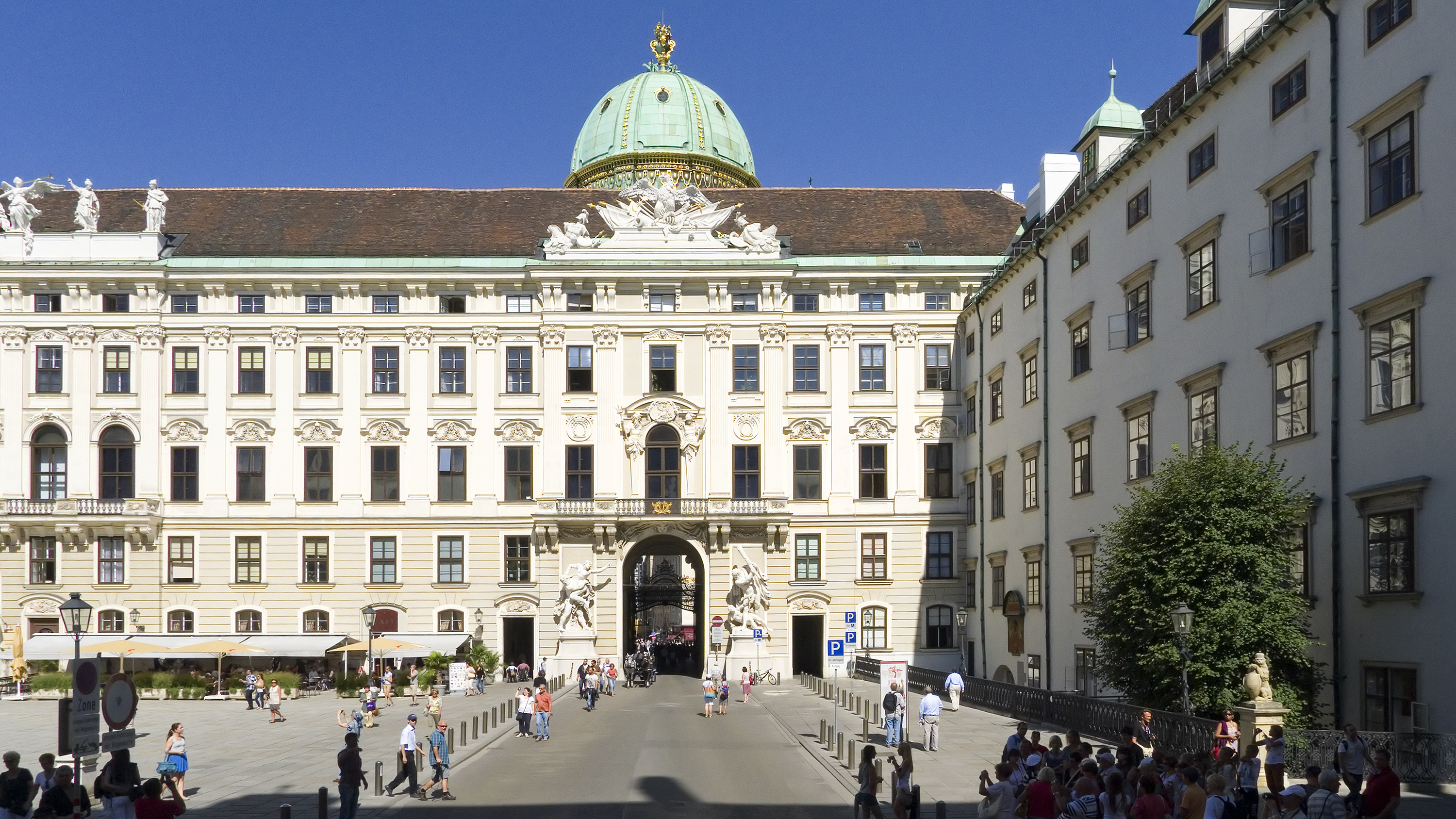 Straße "In der Burg" in Wien 1 beim Leopoldinischen Trakt Richtung Nordosten